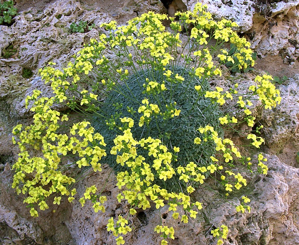 Plante en coussin de 5 à 10 cm, qui pousse sur les falaises calcaire du Caucase. (photo en culture)